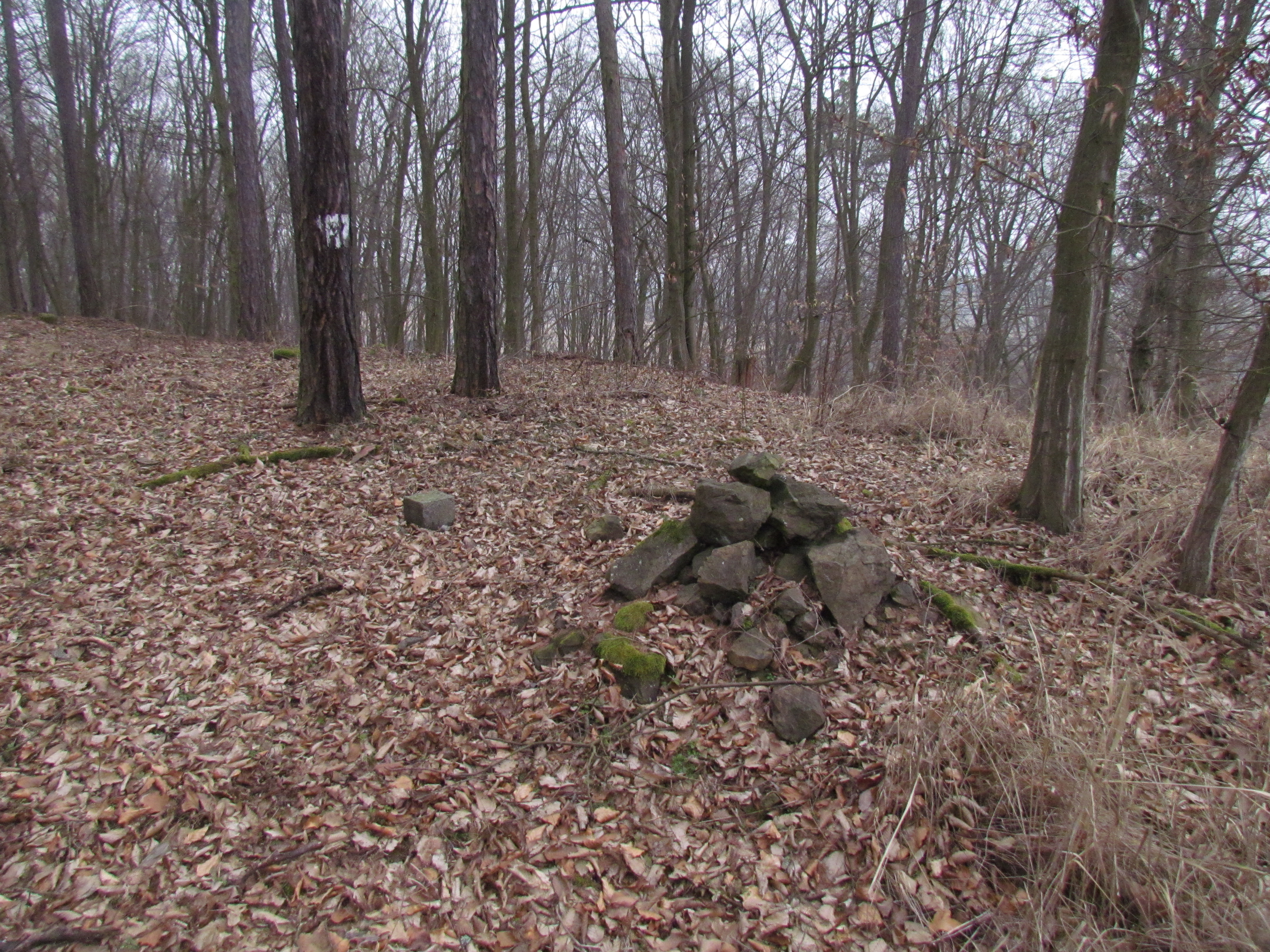 Vrchol Mileče